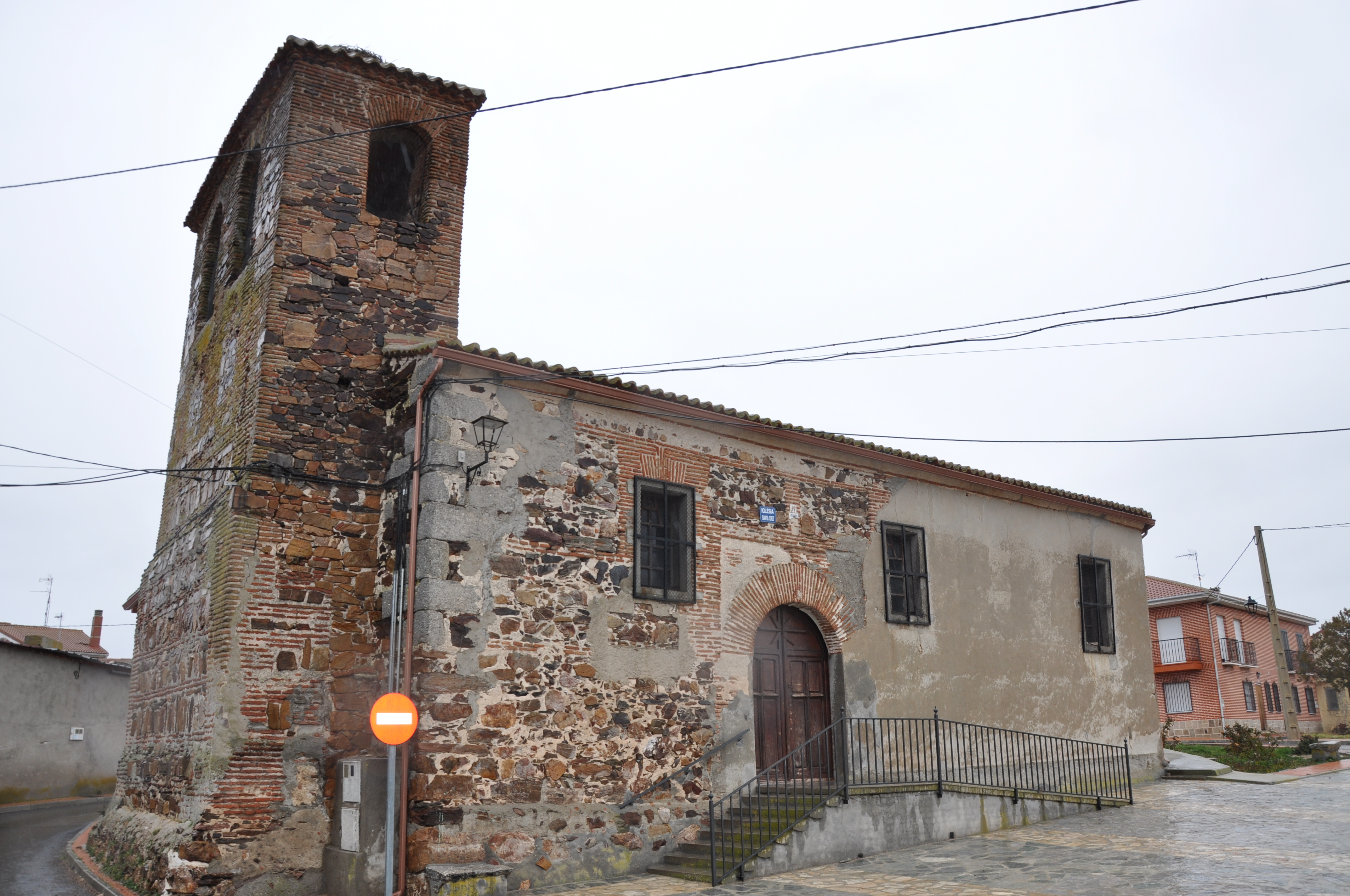 Iglesia parroquial de la Santa Cruz, El Parral, Ávila, España